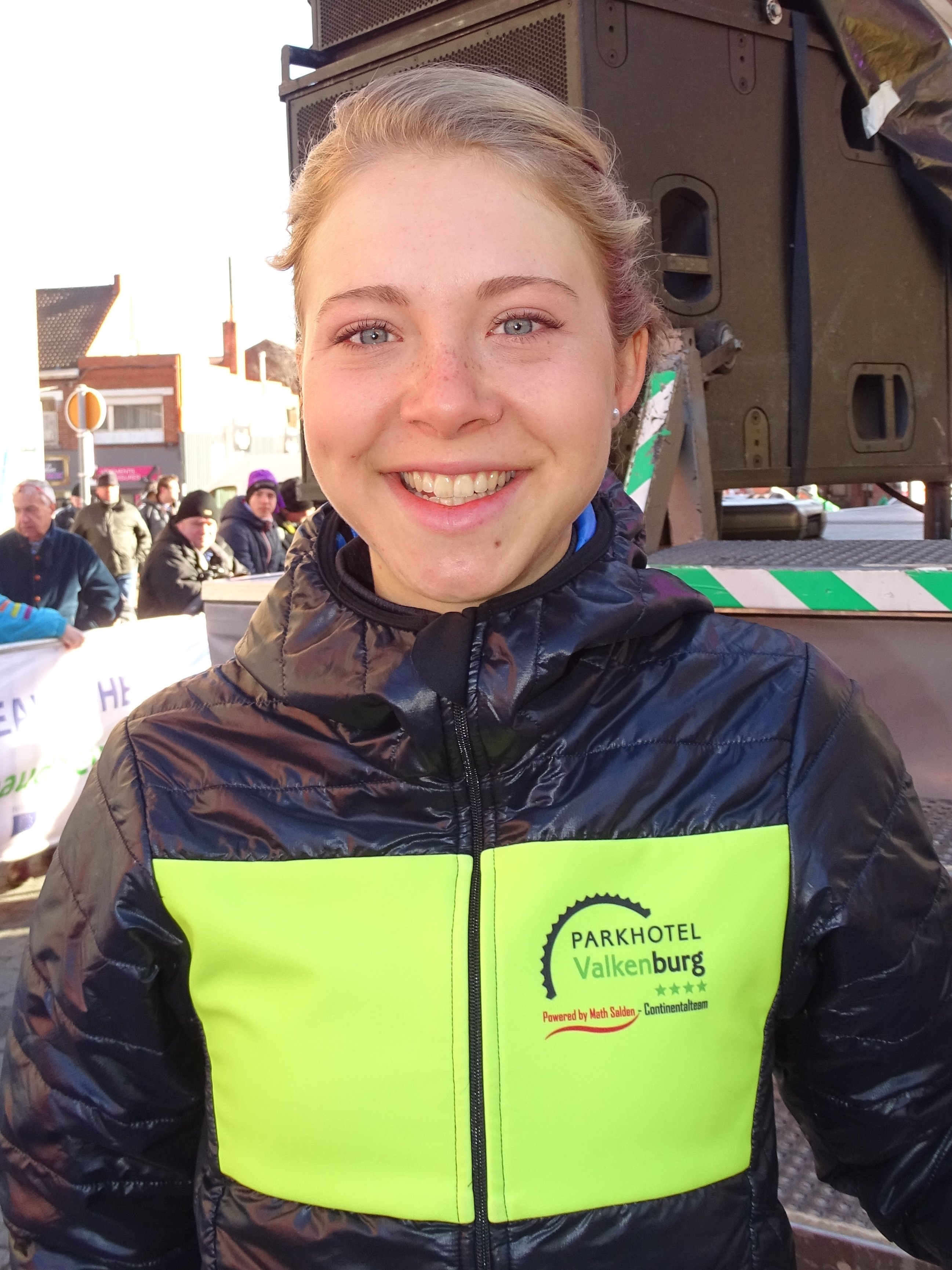 Reportage réalisé le mercredi 2 mars à l'occasion du départ du Samyn des Dames 2016 et du Samyn 2016 à Quaregnon, Belgique.